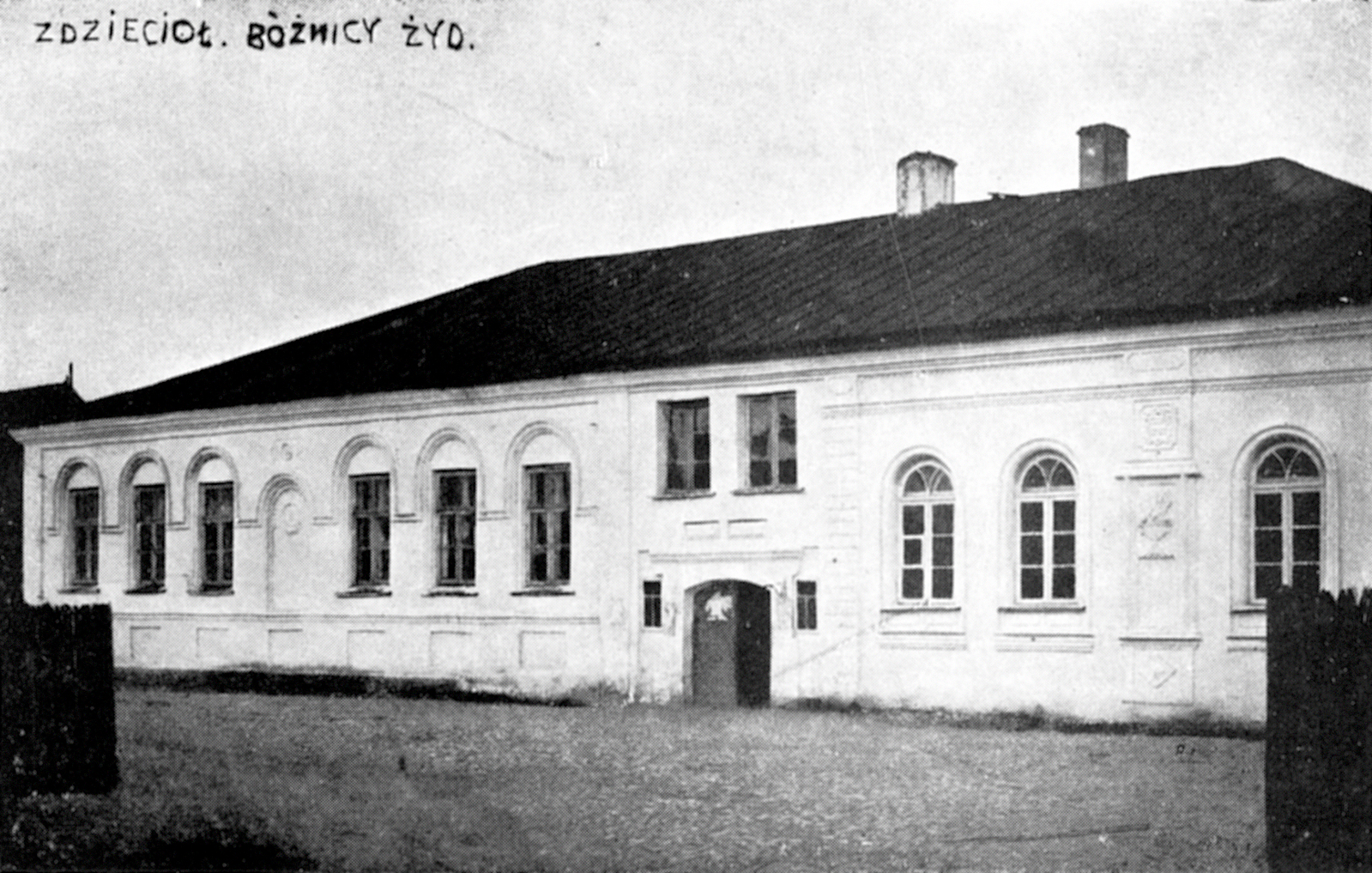 Беларуская (тарашкевіца): Зьдзецел (Ździecieł). Сынагога